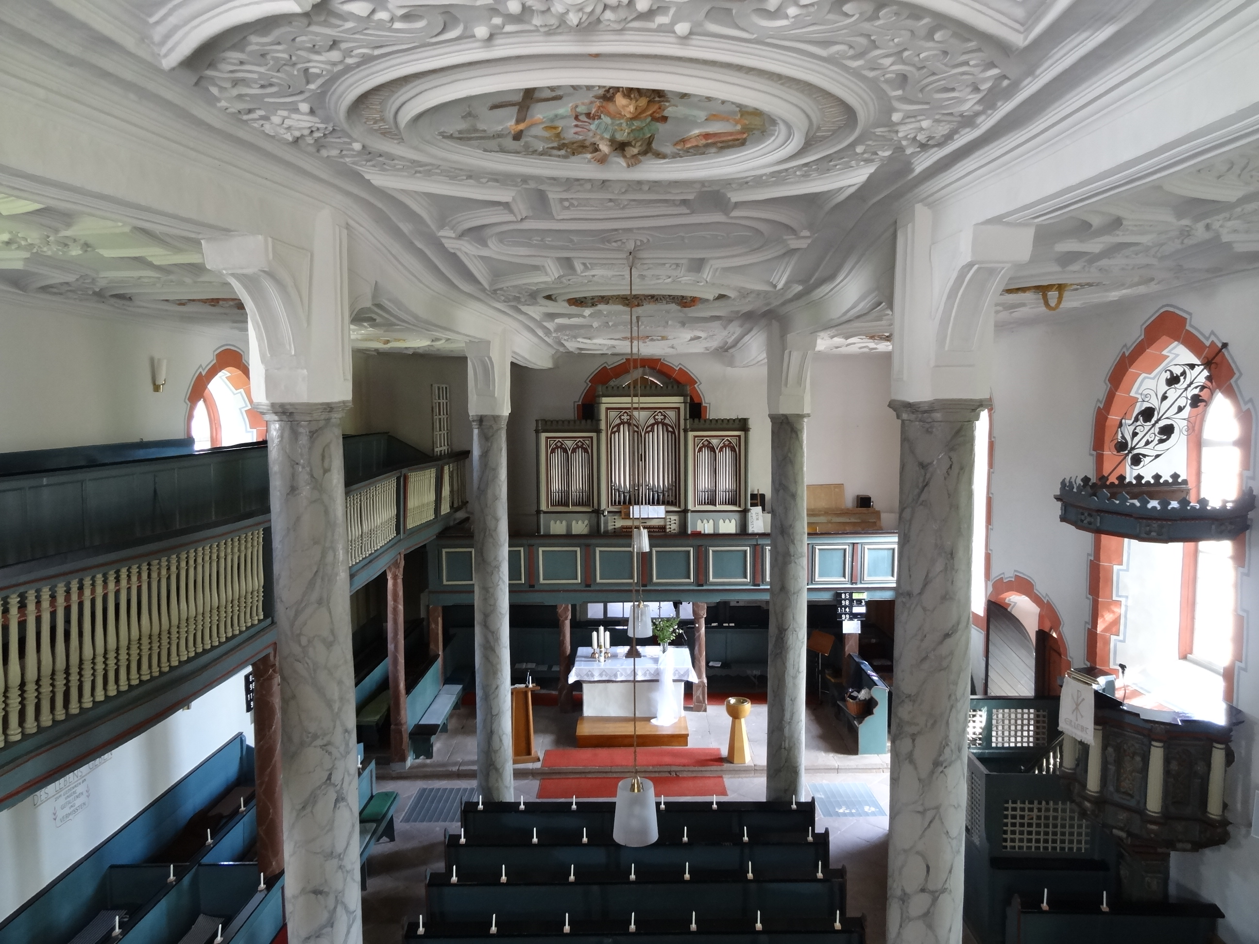 Evangelische Kirche Wohnbach